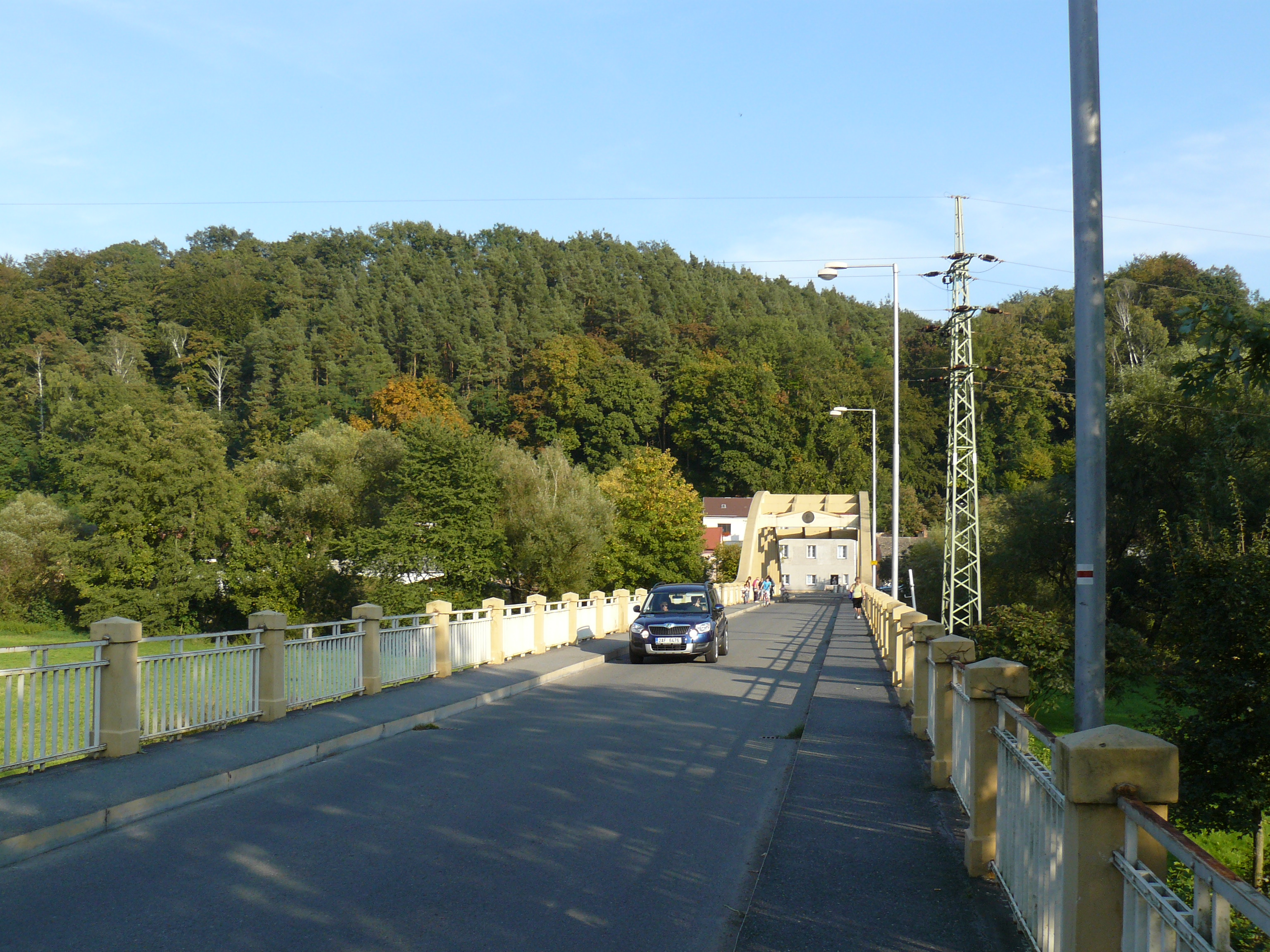 Debř - most přes Jizeru